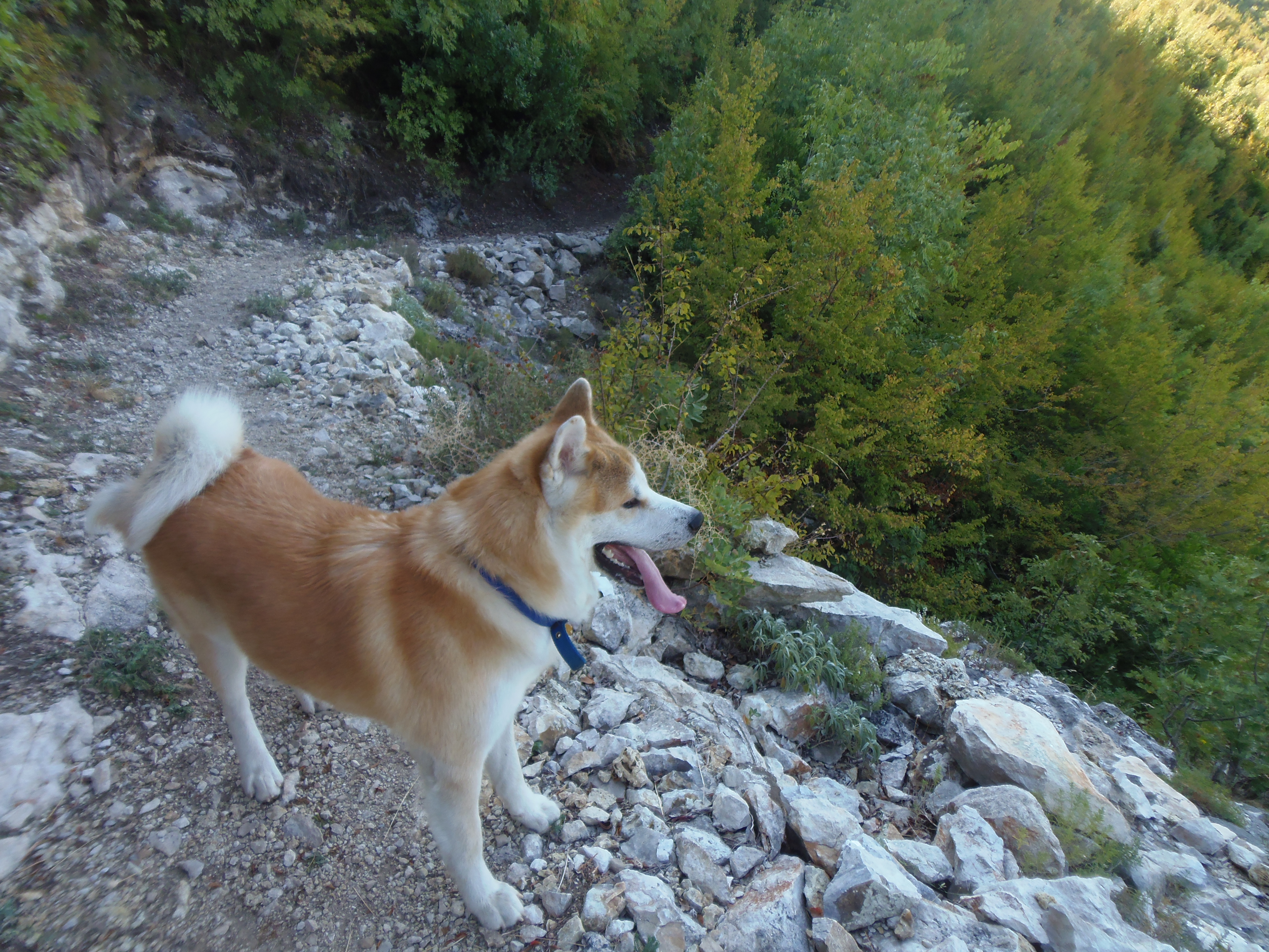 Akita hiking in Shpella e Pëllumbasit, Tiranë, Shqipëri